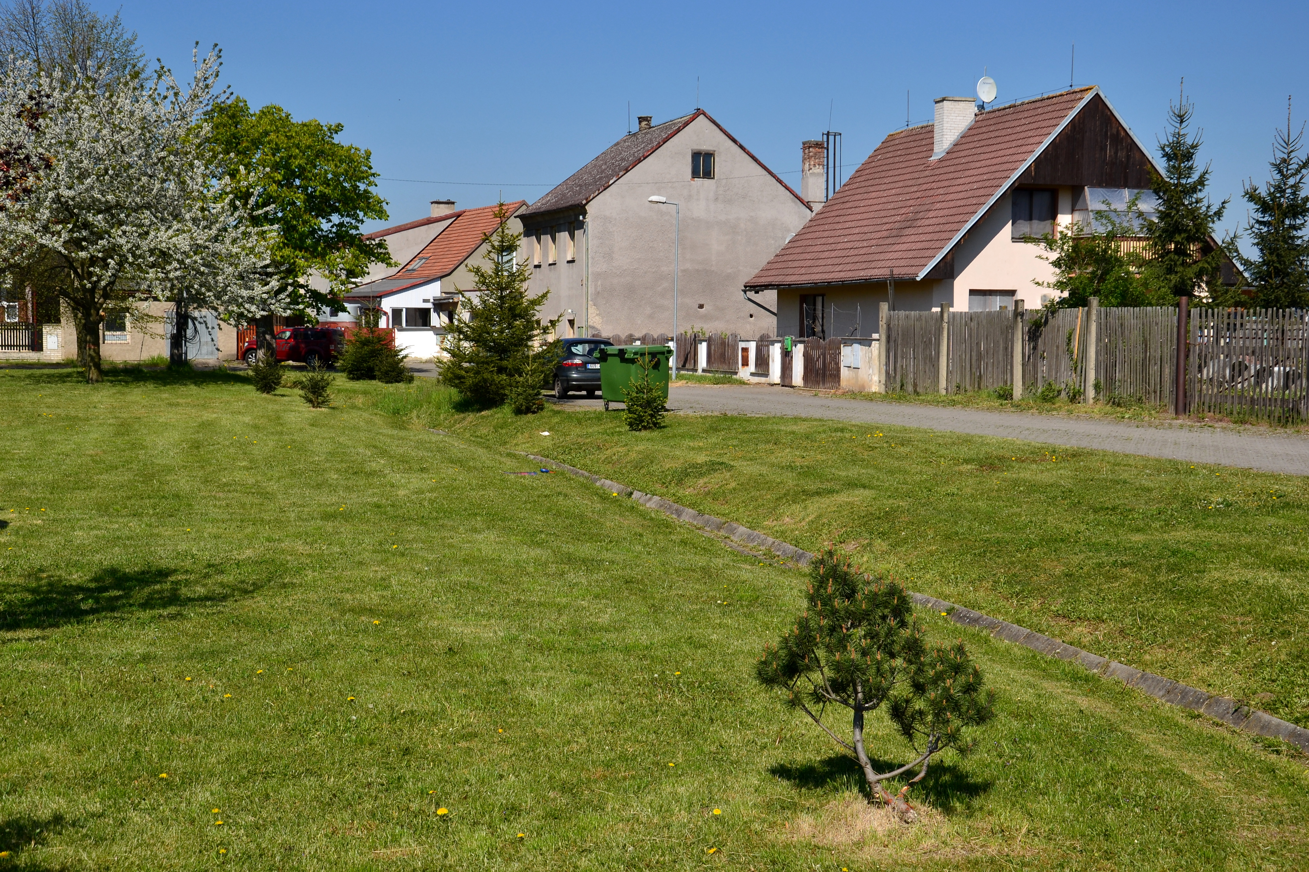 Náves